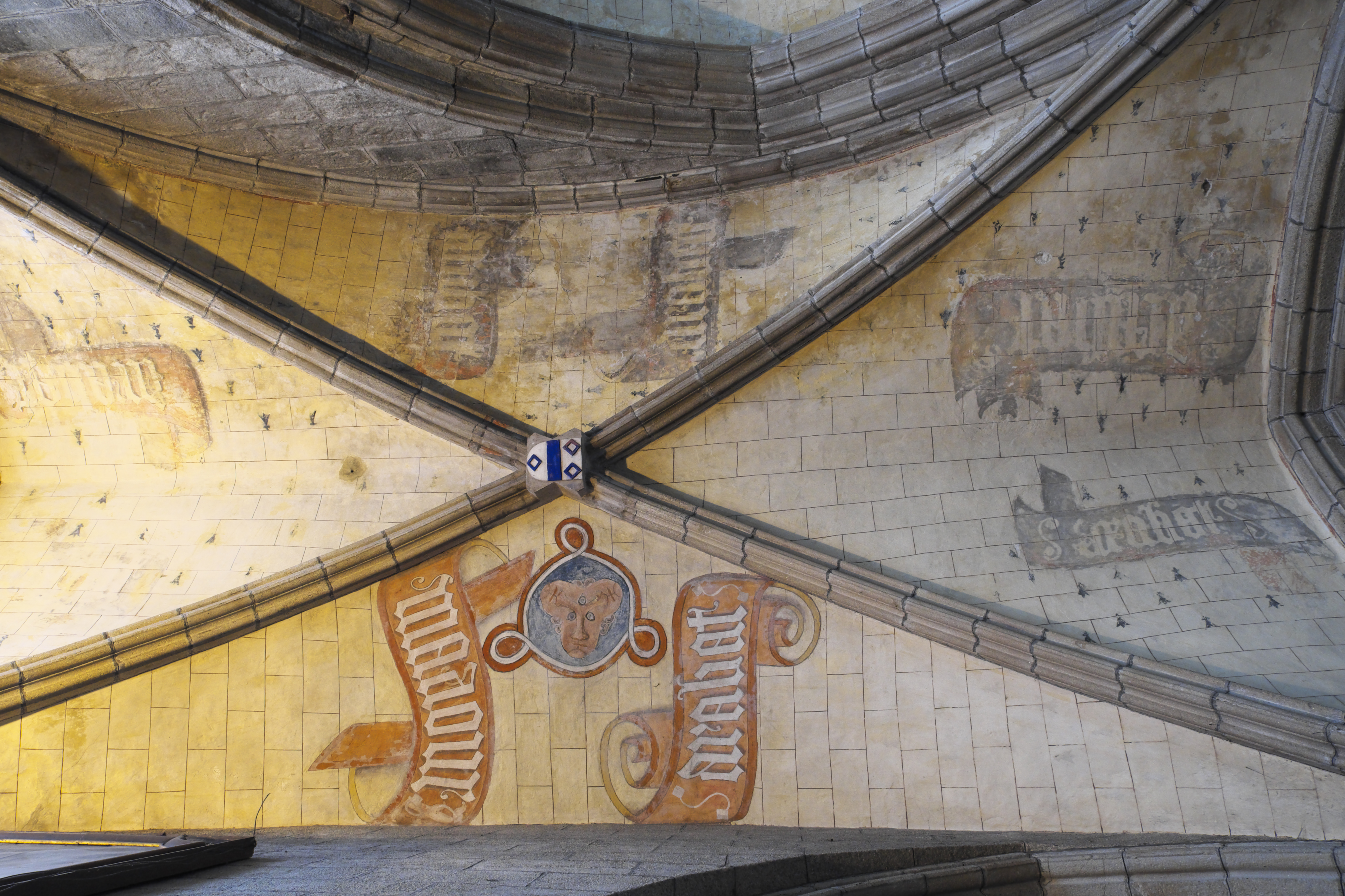 Voûte de la 4e chapelle sud du chœur de la cathédrale Saint-Paul-Aurélien de Saint-Pol-de-Léon (29). Armoiries et devises des Hamon de Pennarue. .